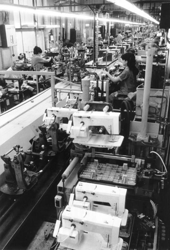 ADN-ZB/29.6.87 Bez. Schwerin: Rationalisierung Wissenschaftlich-technische Lösungen aus dem eigenen Rationalisierungsmittelbau wie diese automatische Hebevorrichtung am Montageband bestimmen den Leistungszuwachs im Wittenberger Nähmaschinenwerk. Während der Plandiskussion 1988 haben sich die Werktätigen vorgenommen, im nächsten Jahr 20000 Haushaltsnähmaschinen mehr zu produzieren als 1987.